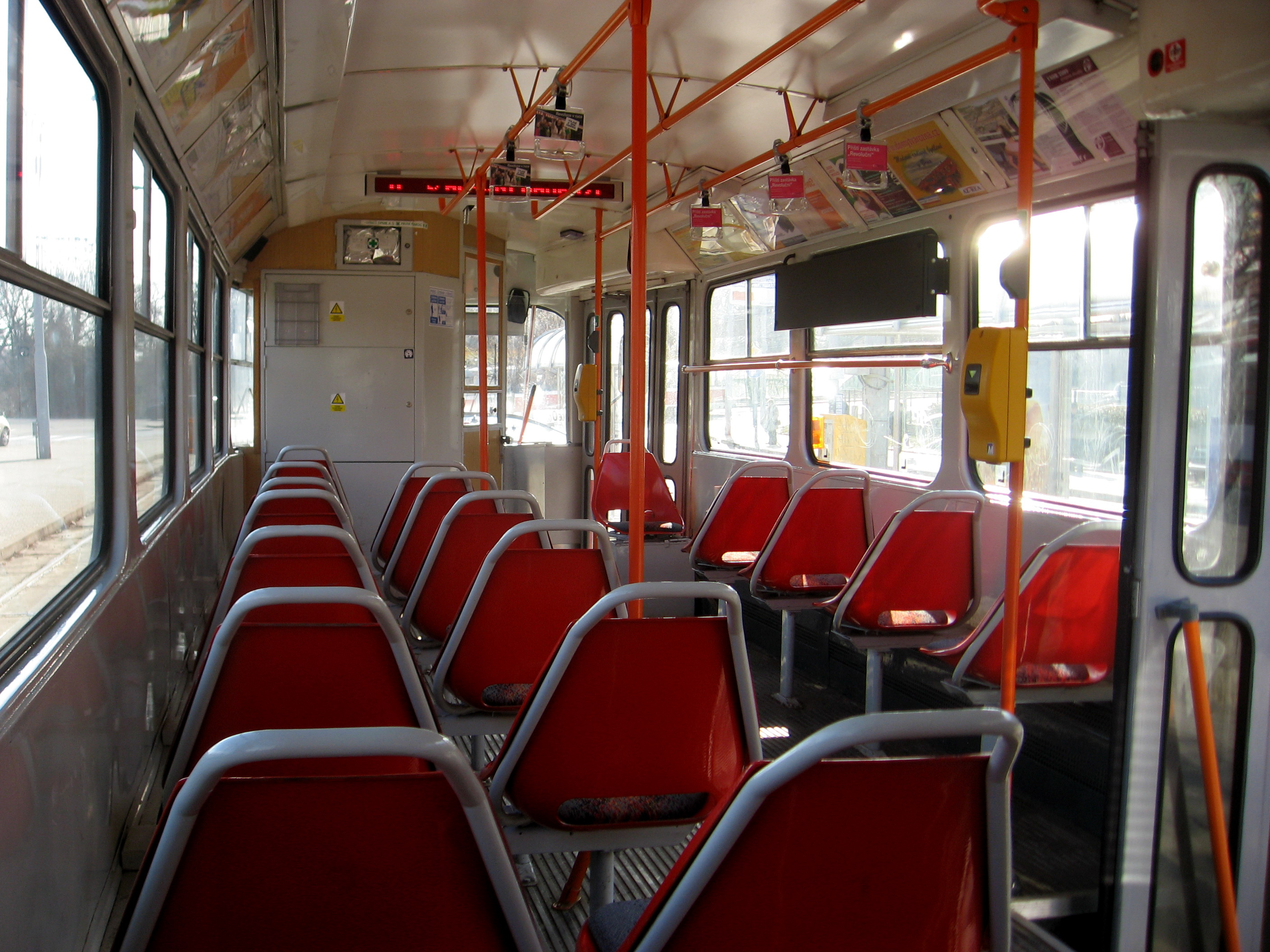 Tatra K2 v Brně, interiér